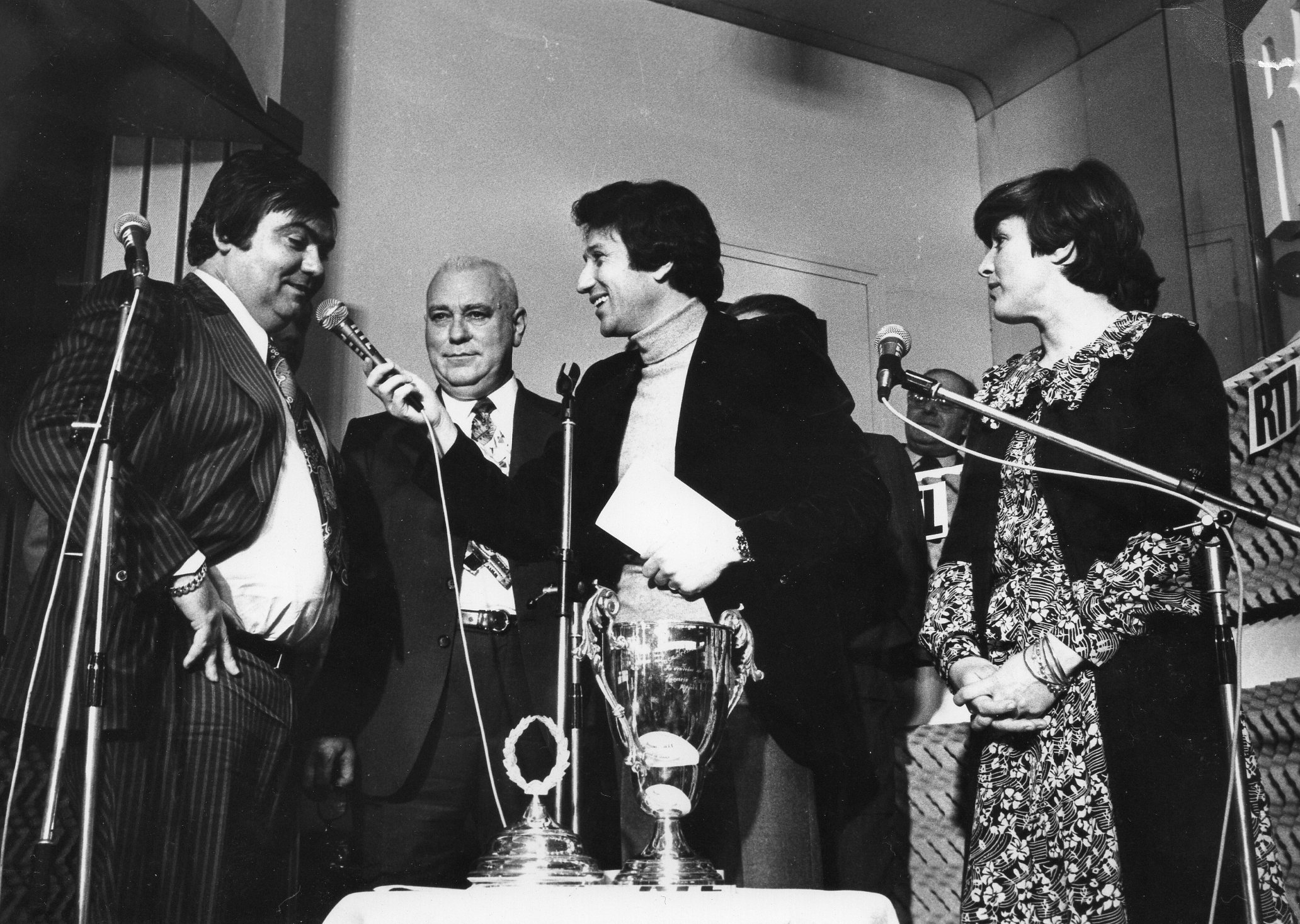 Tirage au sort de la Coupe de France 1978-1979 (sur la photo Louis Nicollin, François Jouvenet, Michel Drucker et Anne-Marie Peysson)